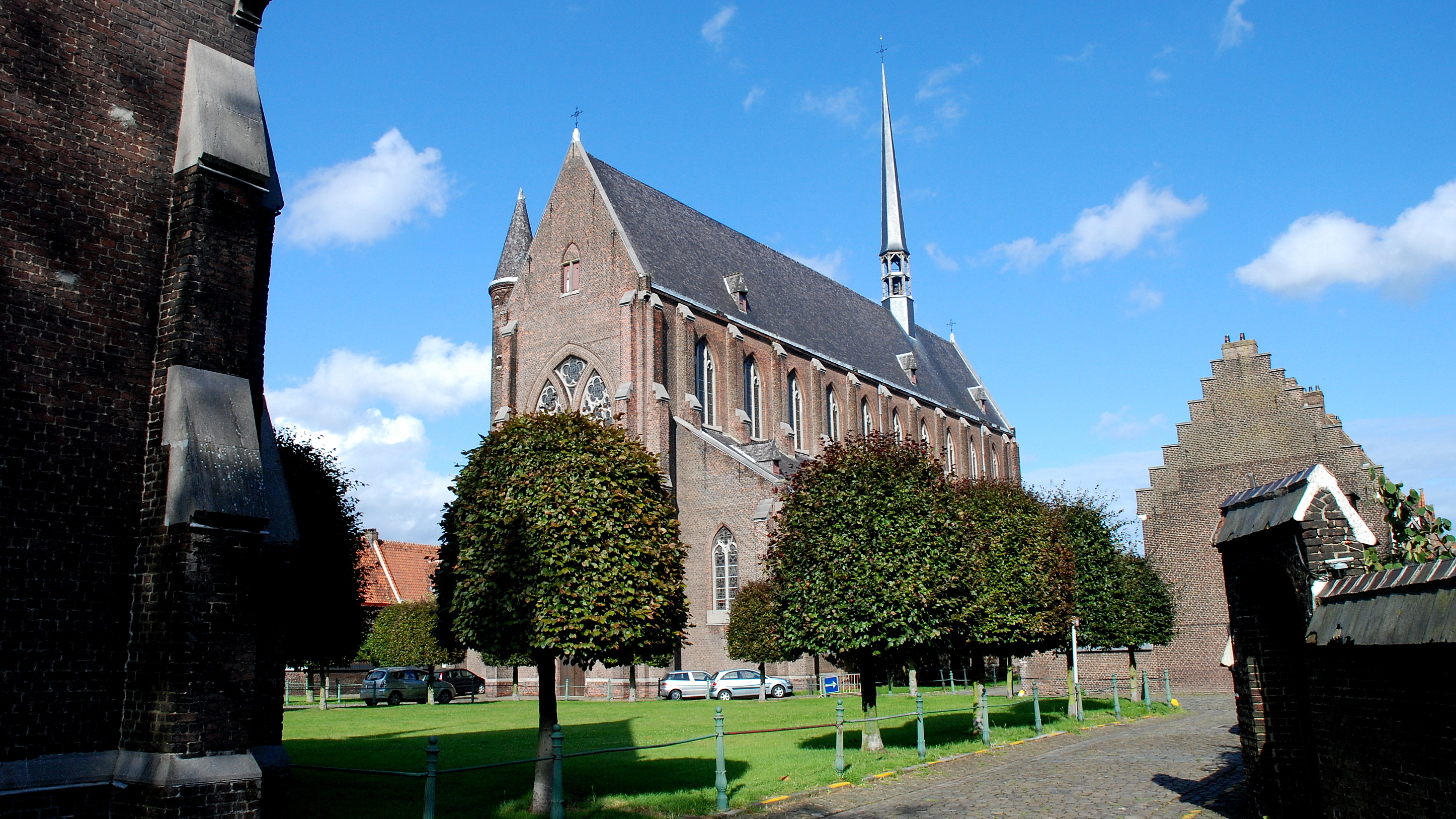 Gent Sint-Amandsberg Begijnhofkerk 19-8-2008